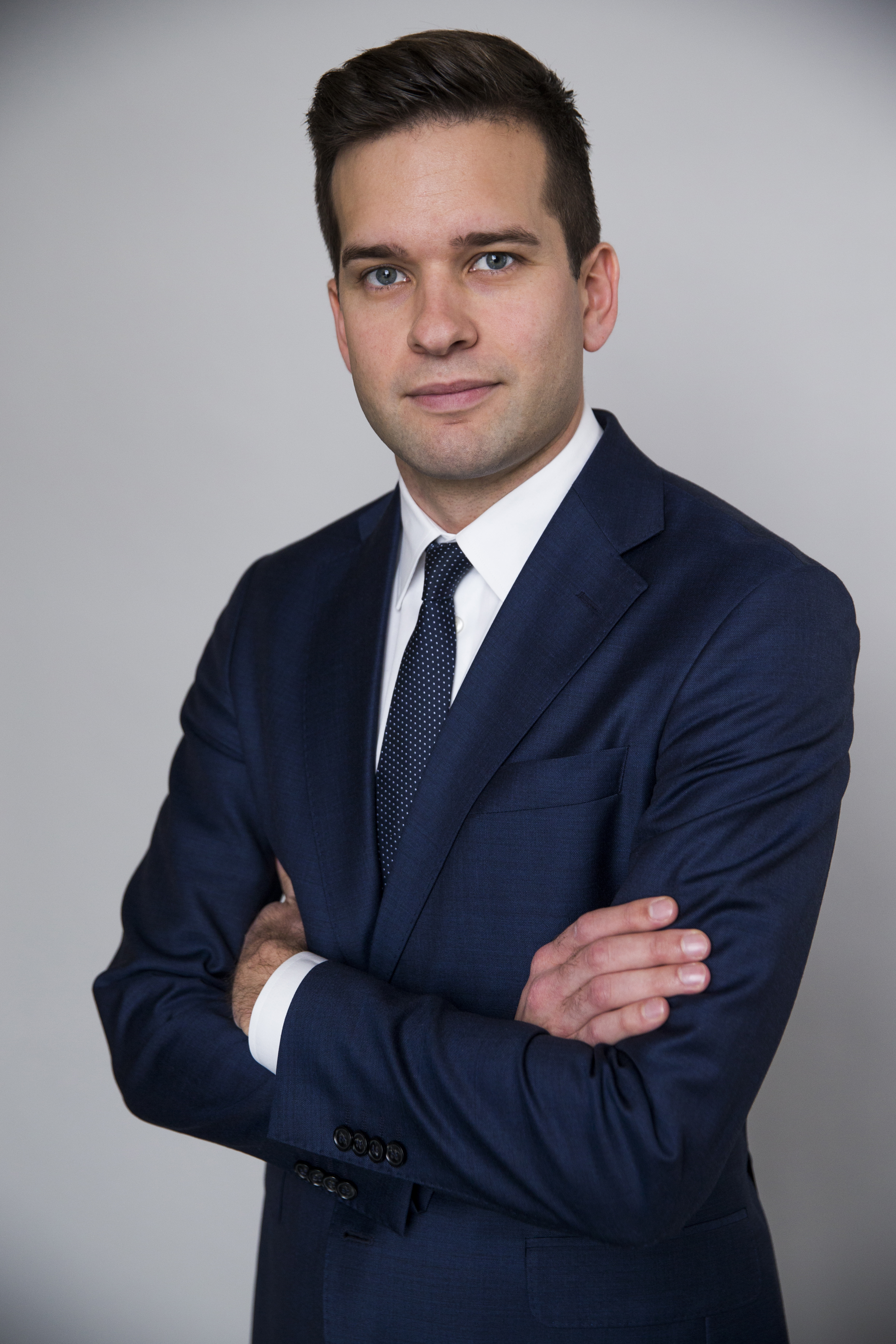 Folkhälsominister, Sjukvårdsminister och Idrottsminister. Statsråd i Regeringen Löfven, Gabriel Wikström.